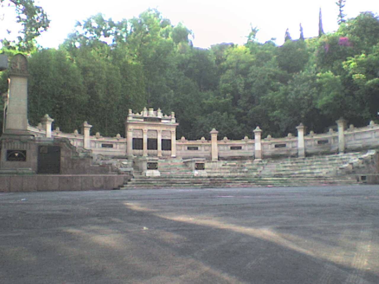 Tribuna Monumental. Toma abierta.